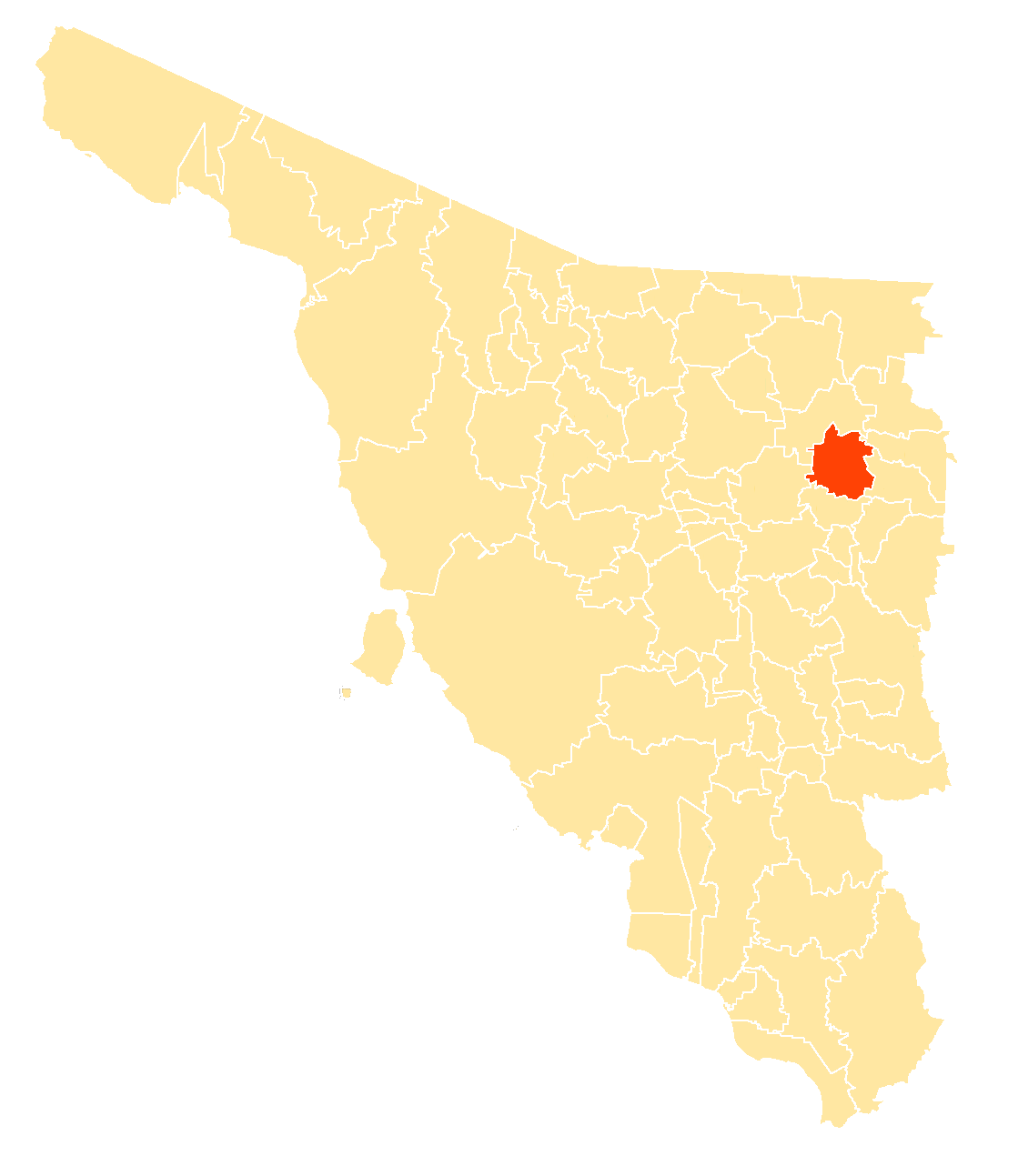 Municipio en Sonora, México.